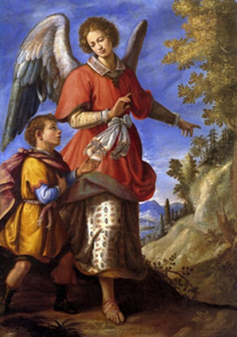 La obra representa un ángel custodio.